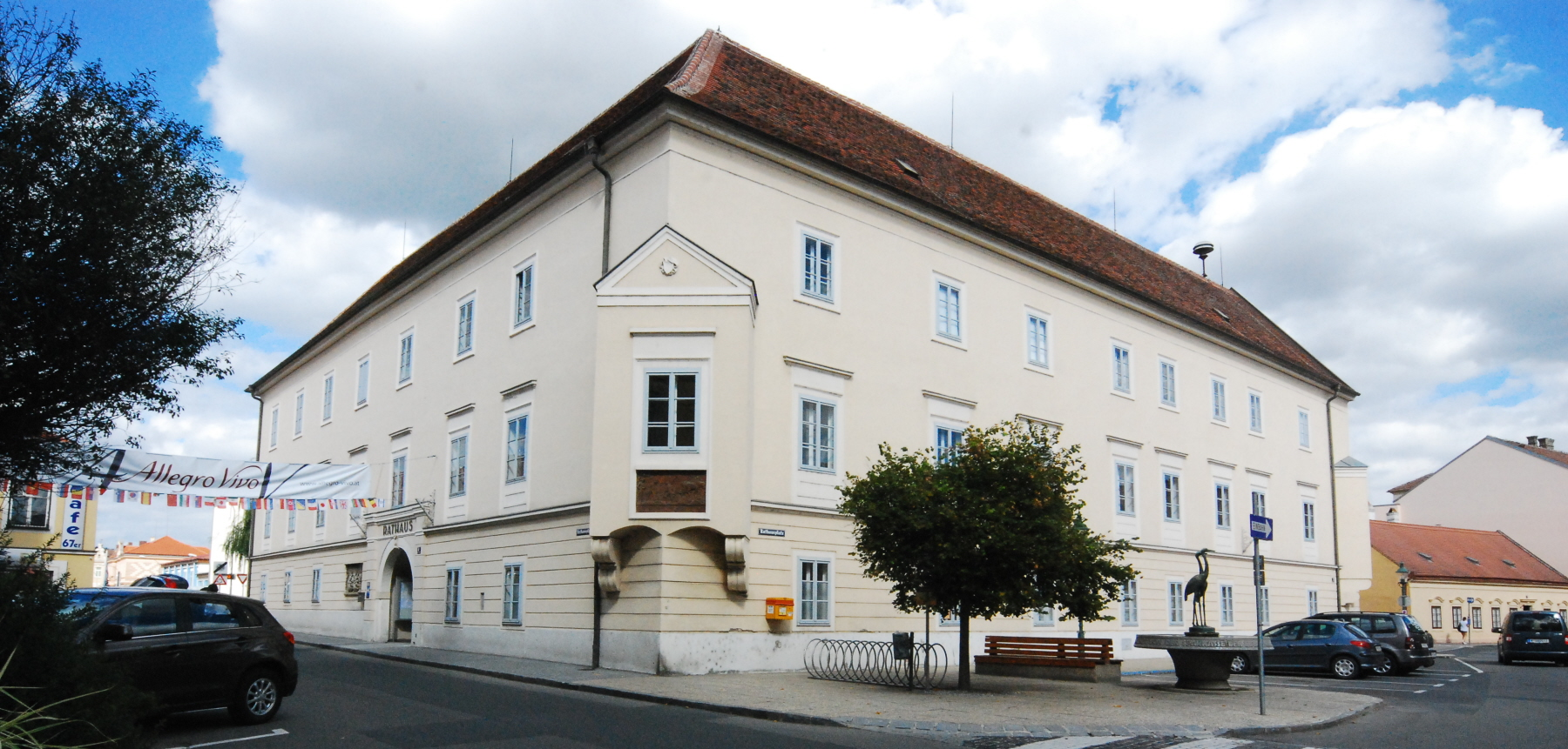 Rathaus, ehem. Thurnhof